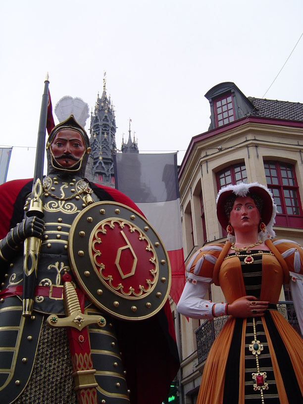 Le géant Gayant et sa femme Marie Cagenon devant le beffroi de Douai - fêtes de Gayant